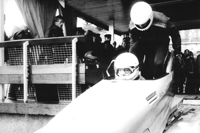 Detlef Richter, Dietmar Jerke ADN-ZB Schaar 14.10.82 Bez. Suhl: Das Saison Eröffnungsrennen im Zweierbob gewannen in Oberhof die EM-Vierten Detlef Richter Dietmar Jerke vom ASK Oberhof. Mit 3:11,29 min verwiesen sie ihre Klubkameraden Lehmann Weise und die WM-Dritten Schönau-Kirchner auf die Plätze.